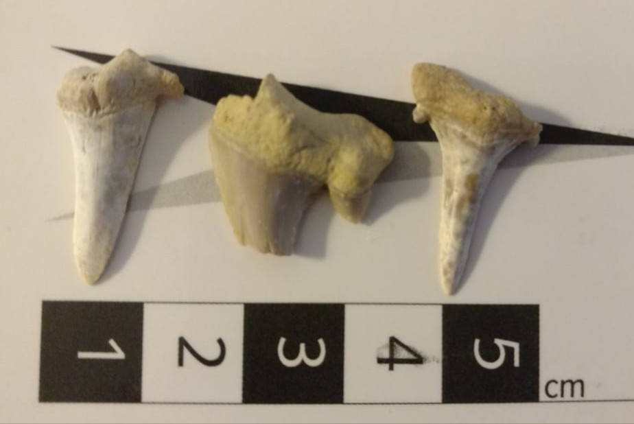 Ejemplar de dientes de la especie de Cordado Chondrichtyes Huxley, Cretolamna appendiculata,Agassiz, 1843, de Barda Norte, formación Roca, Cuenca Neuquina, provincia de Rio Negro, Argentina.